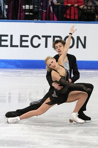 Схари Кох и Кристиан Нюхтерн (Германия) на чемпионате мира по фигурному катанию среди юниоров 2012